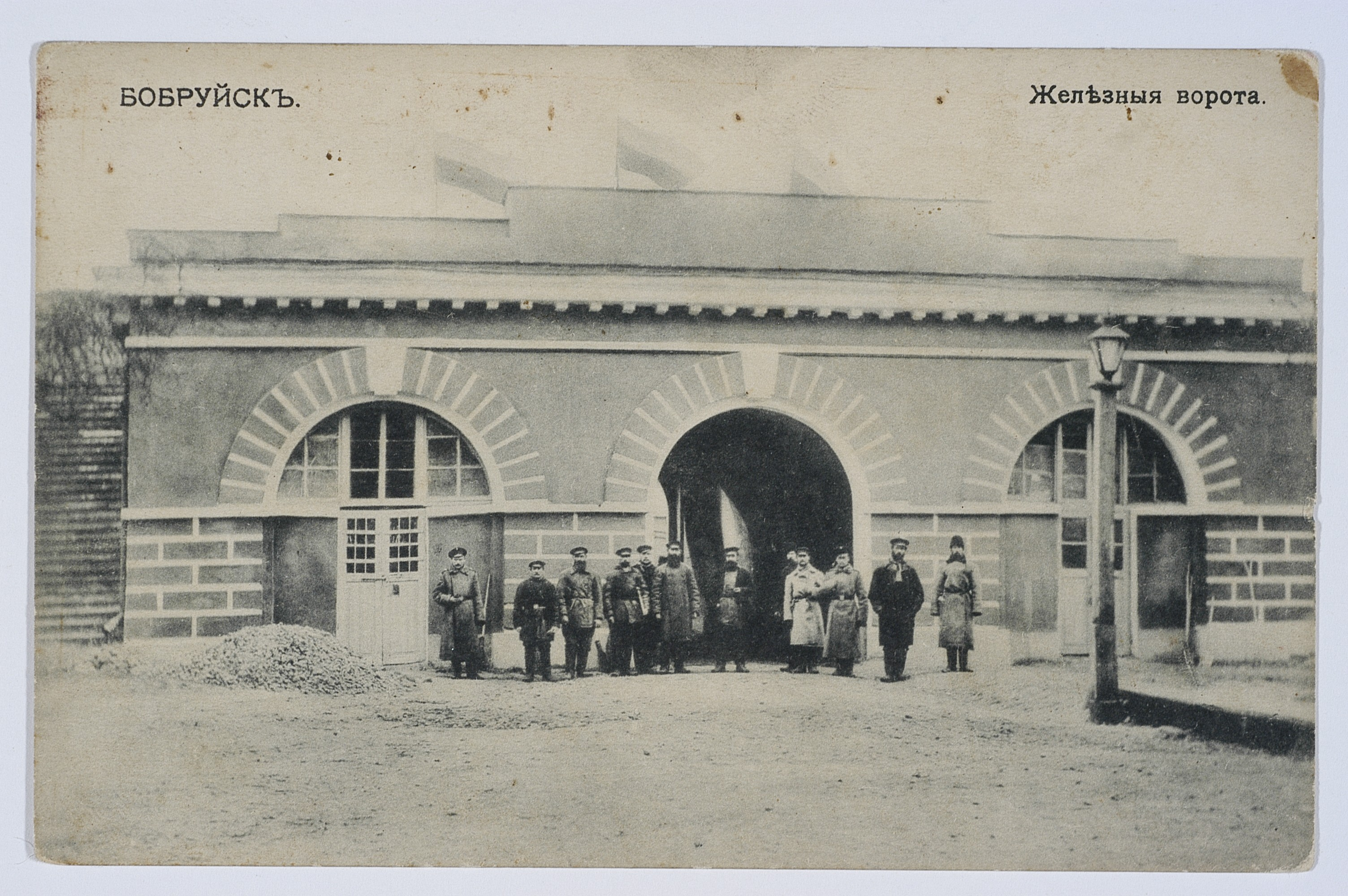 Беларуская (тарашкевіца): Бабруйск (Babrujsk), Менская (Mienskaja brama) або Жалезная брама (Žaleznaja brama)